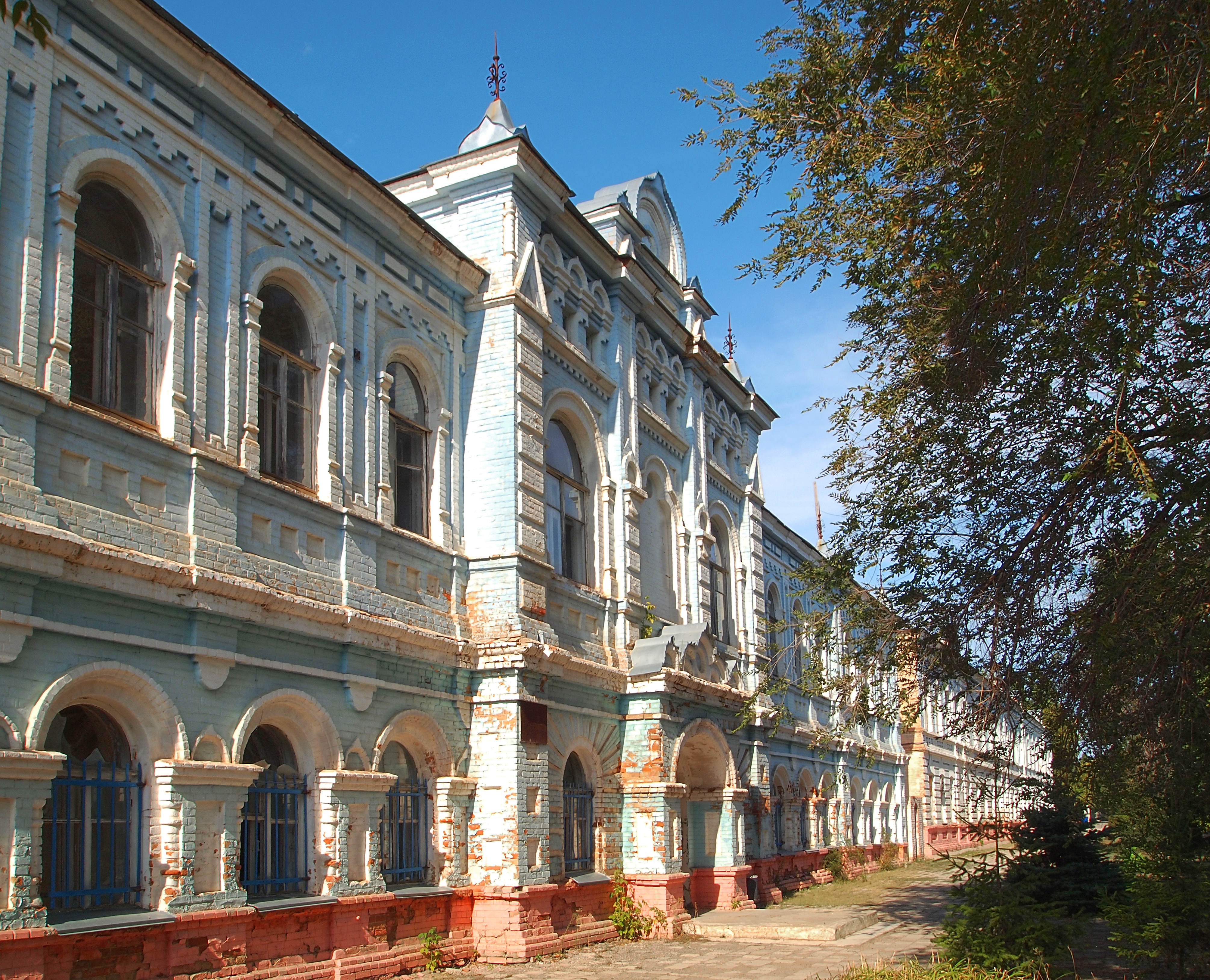 Здание реального училища: улица 30 лет Победы, 13 / улица Советская, Новоузенск, Новоузенский район, Саратовская область